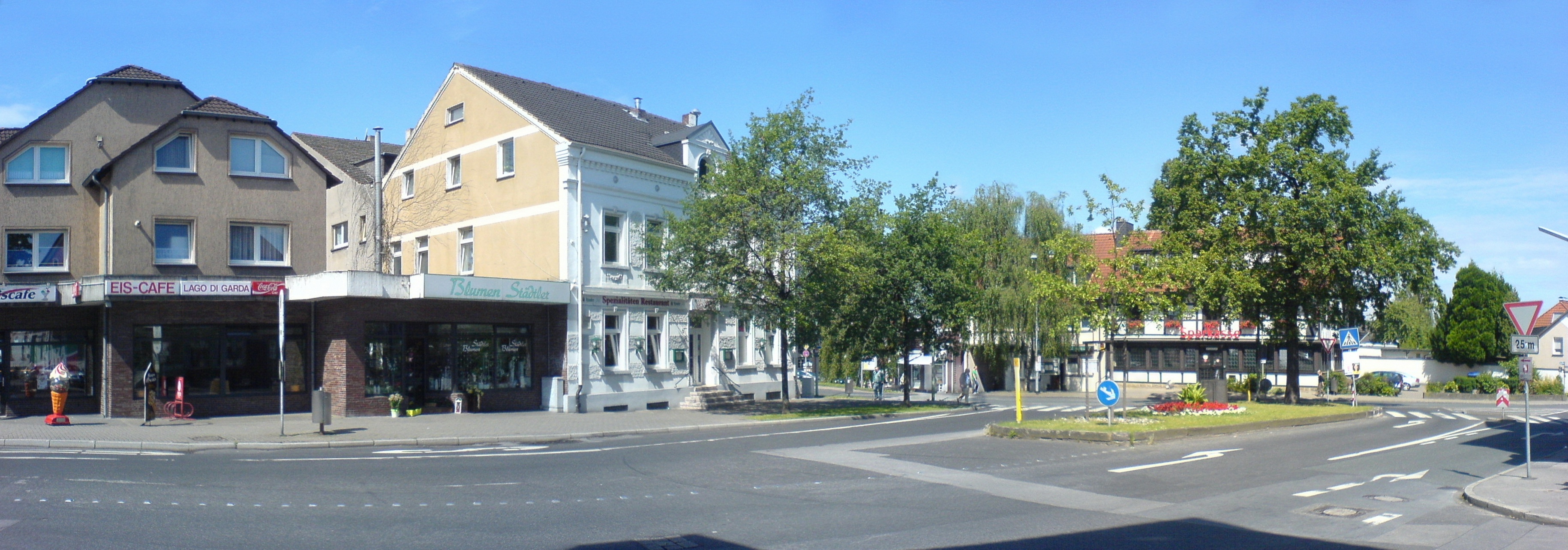 Bochum-Eppendorf Mitte